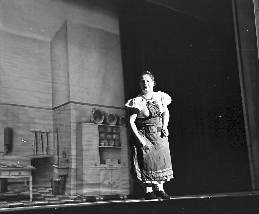 Wintergarten (Varieté); Claire Schlichting